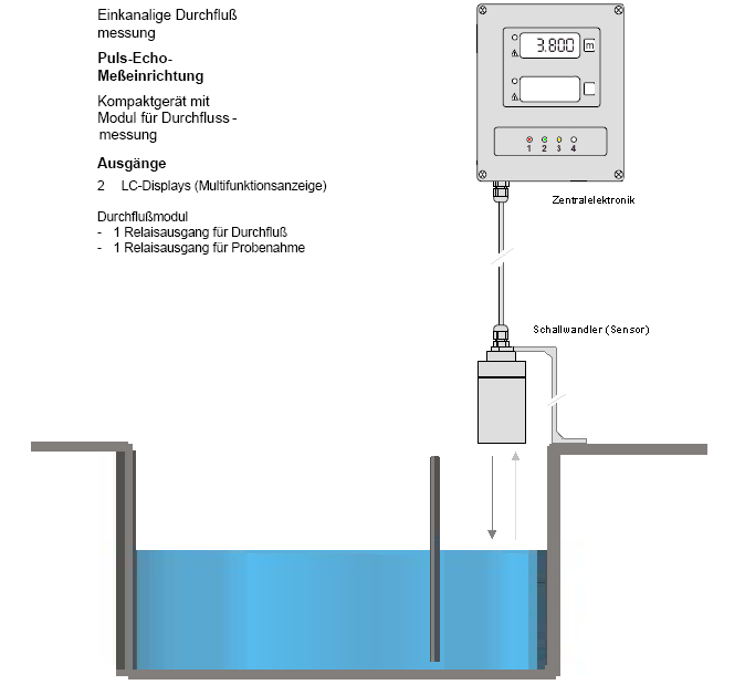 Ultraschall Durchflussmessung (offene Gerinne) / auch Füllstandmessung